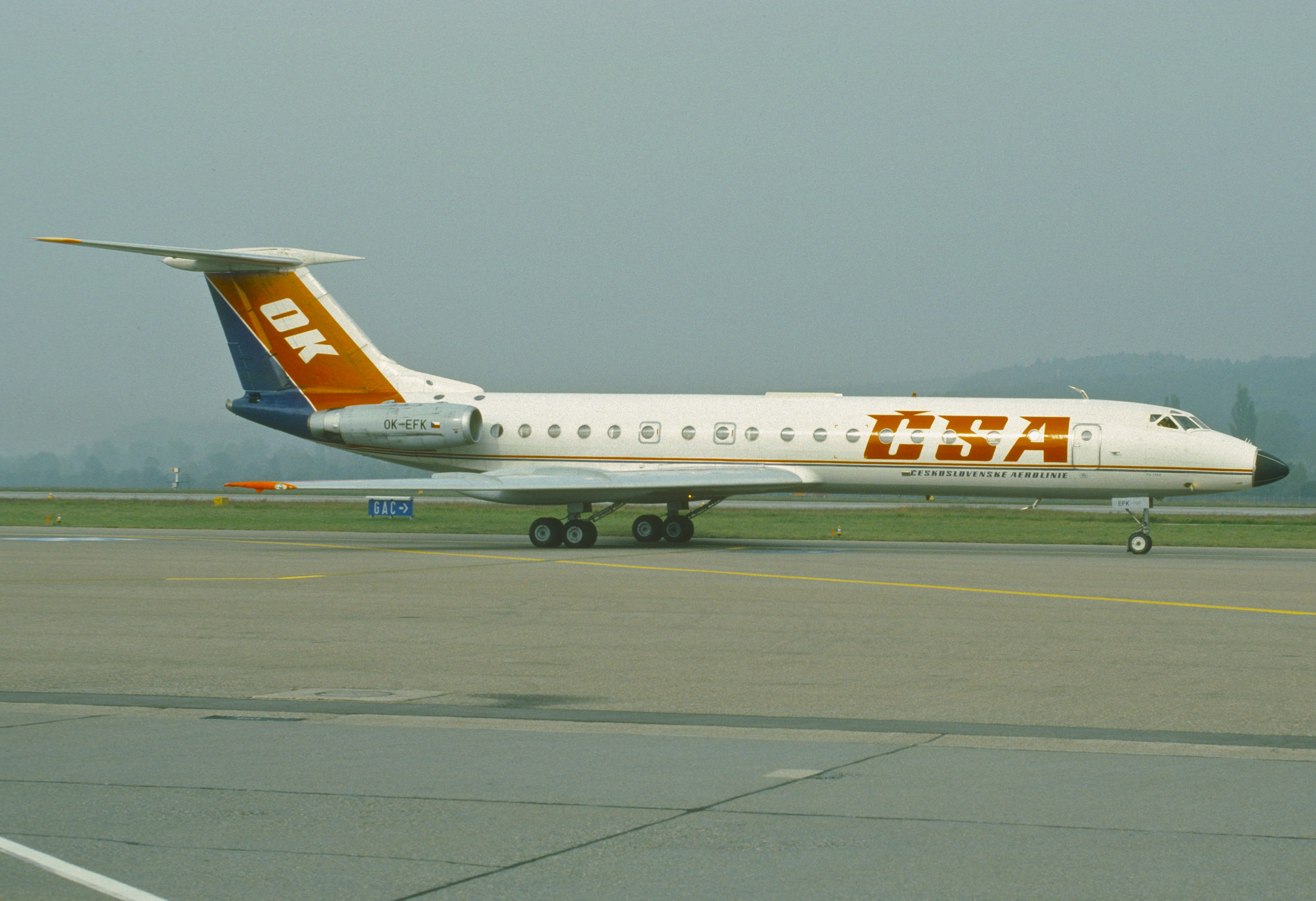 Tupolev Tu-134A (OK-EFK) Československých aerolinií, november 1991